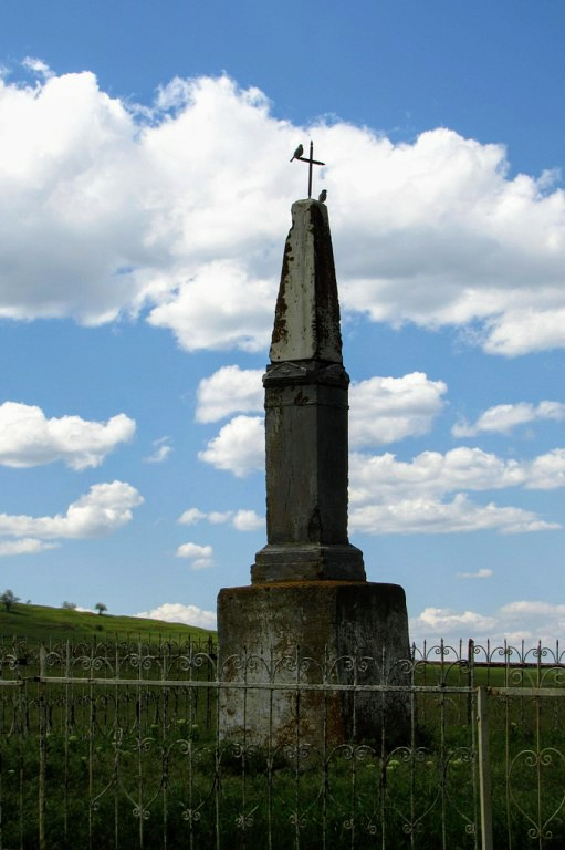 Памятник на могилі засновника села пана Курта.